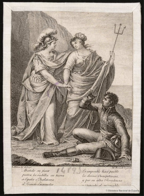 Alegoría de España e Inglaterra ante Napoleón